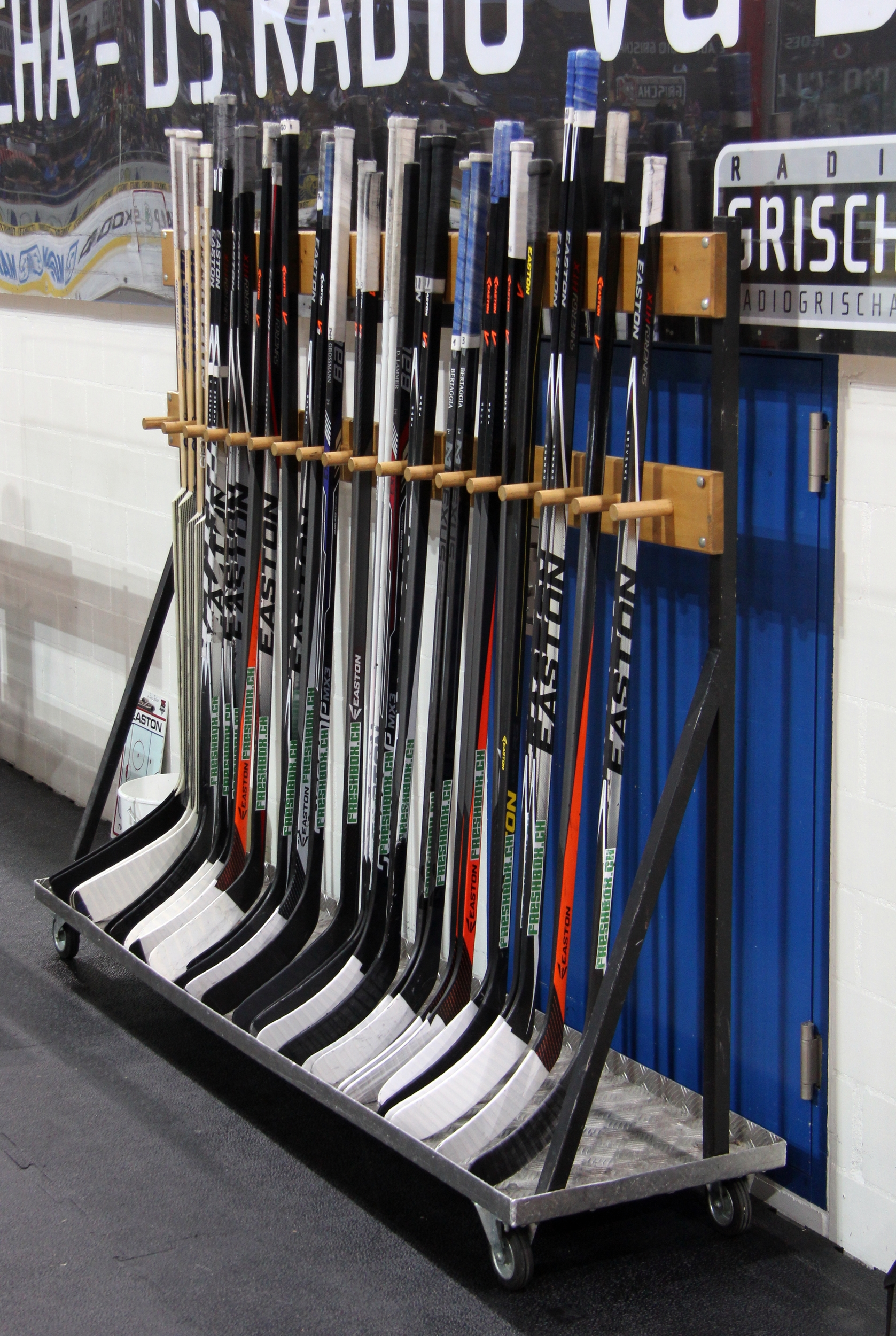 Crosses des joueurs du EV Zug.